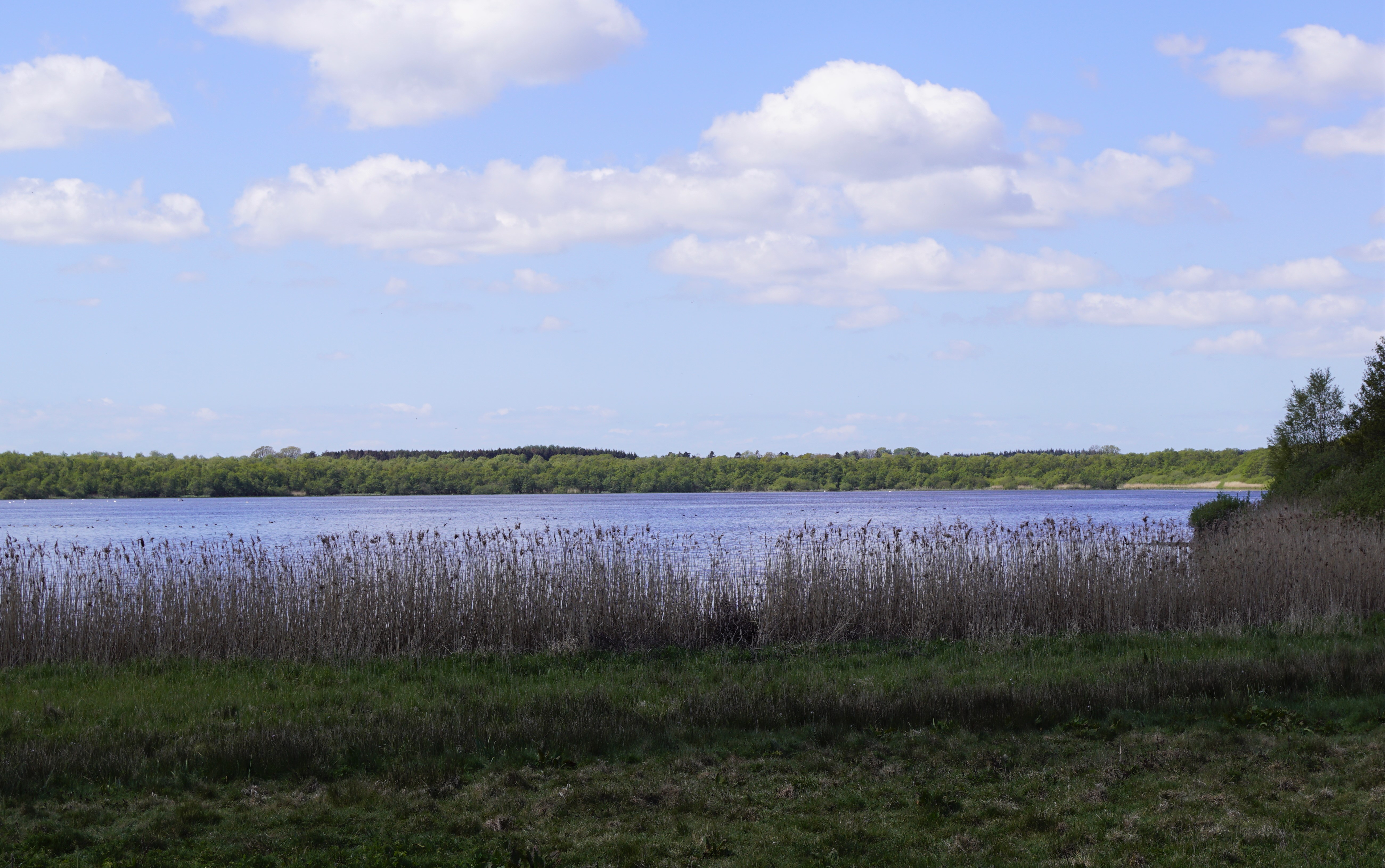 Brændegård Sø på Fyn set mod nordvest